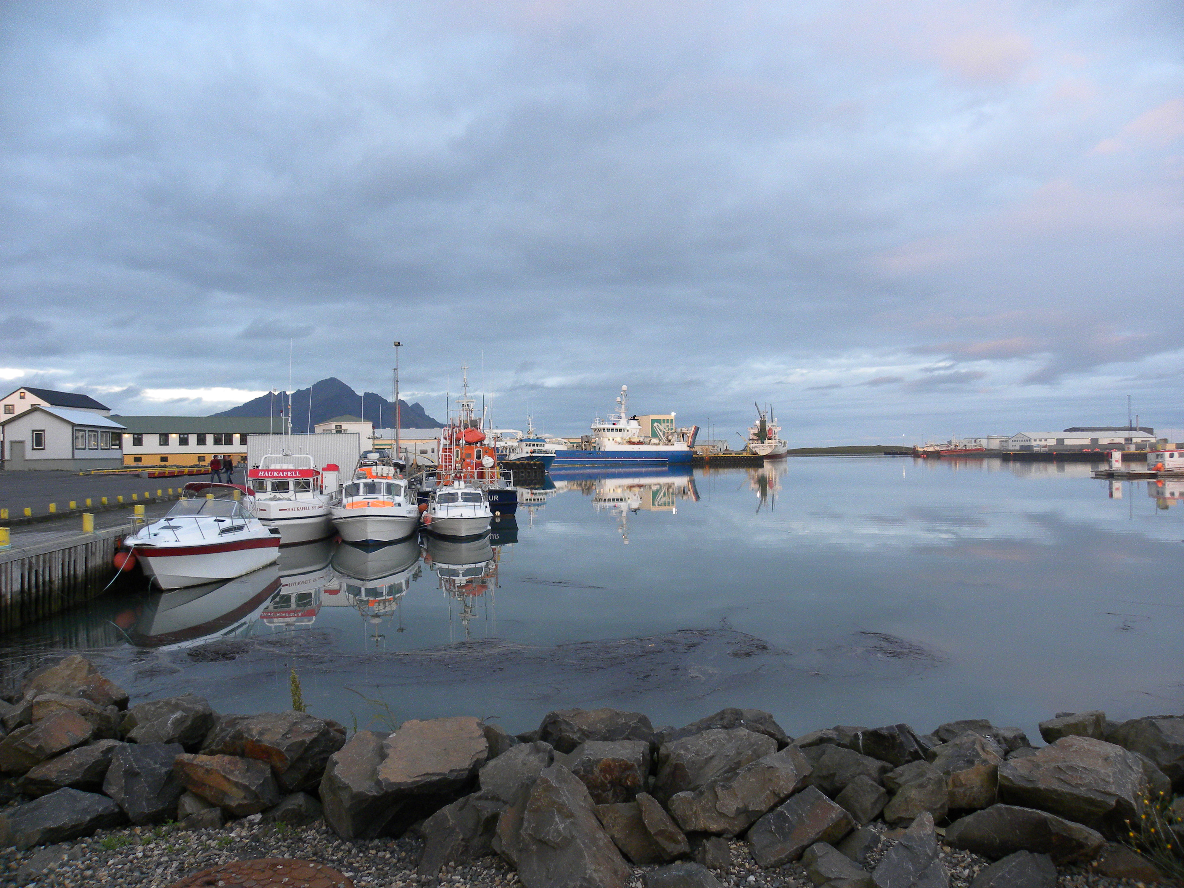 Höfn